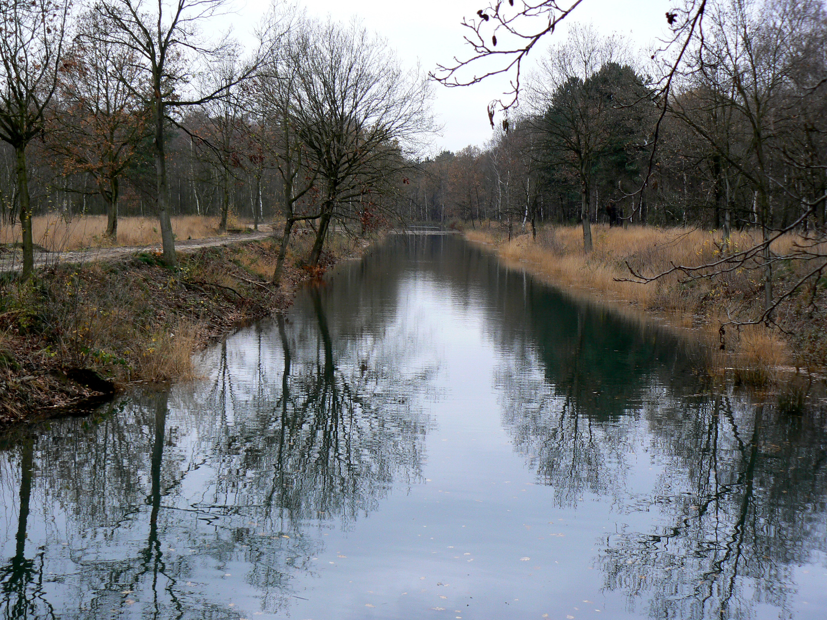 Antitankgracht, Kapellen (Belgium)